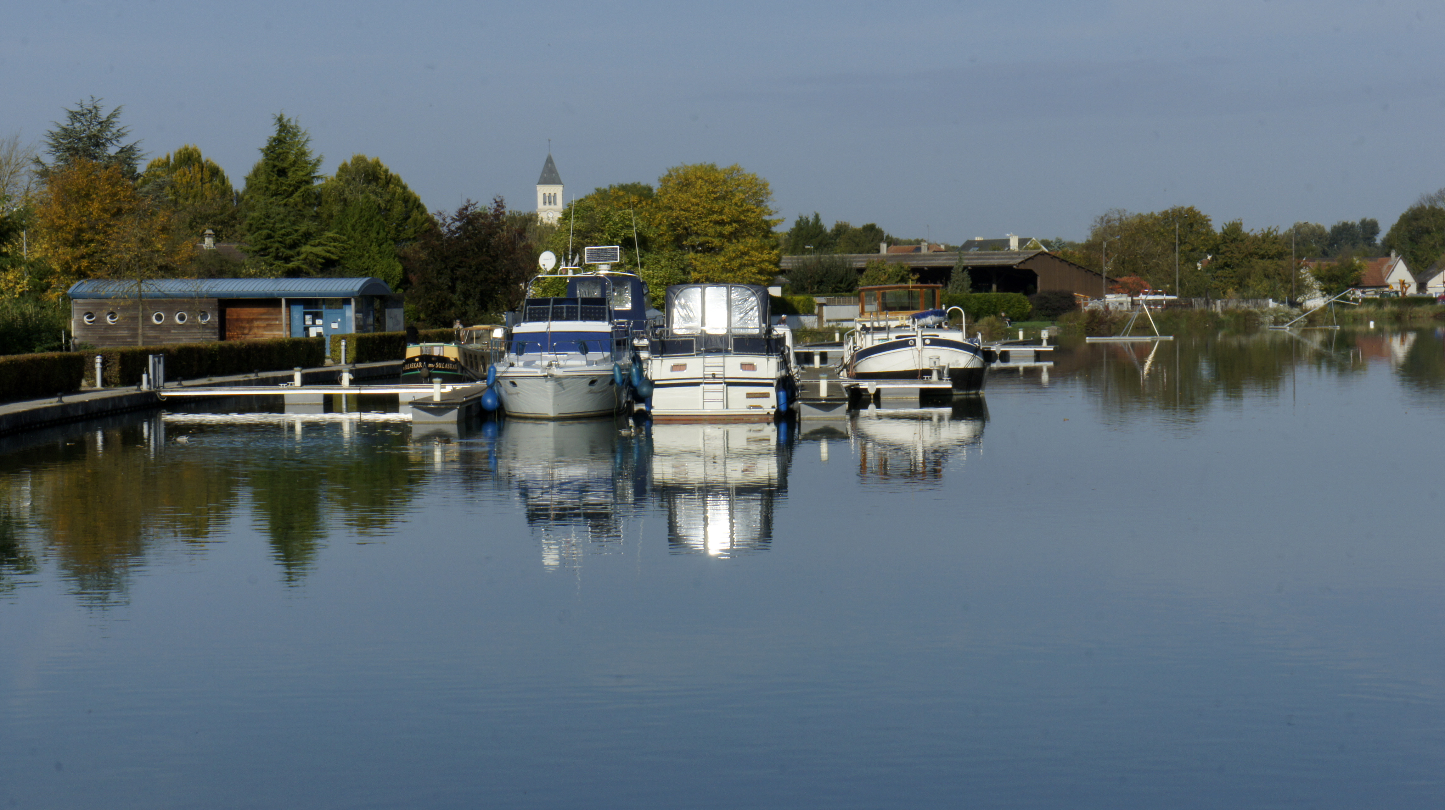 Vue du port de Sillery d'est en ouest.